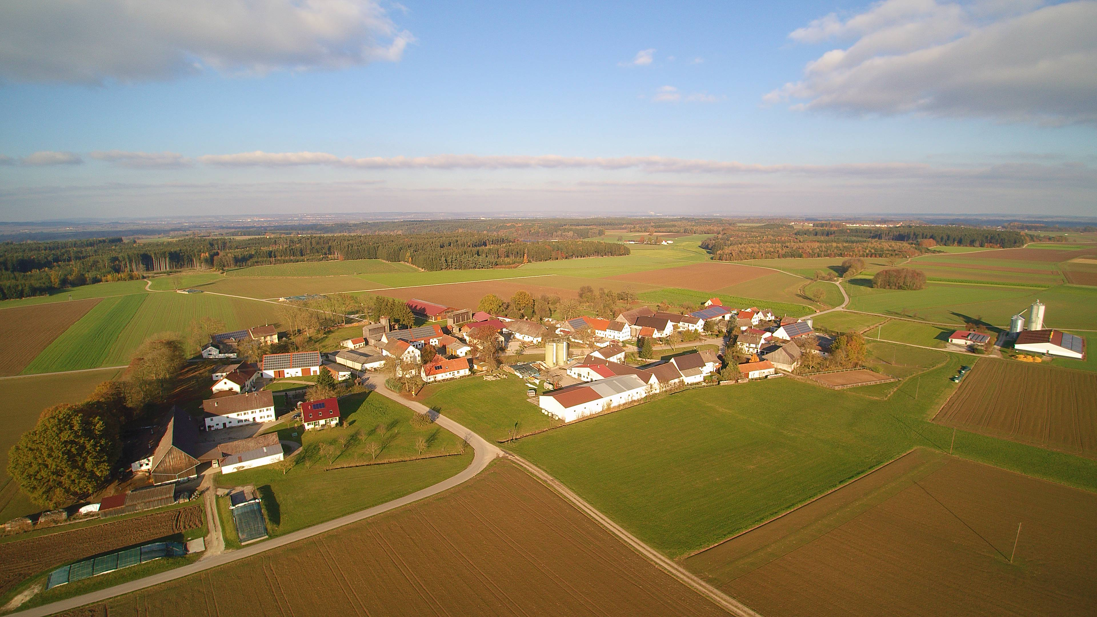 Ortsbild von Neuweiler